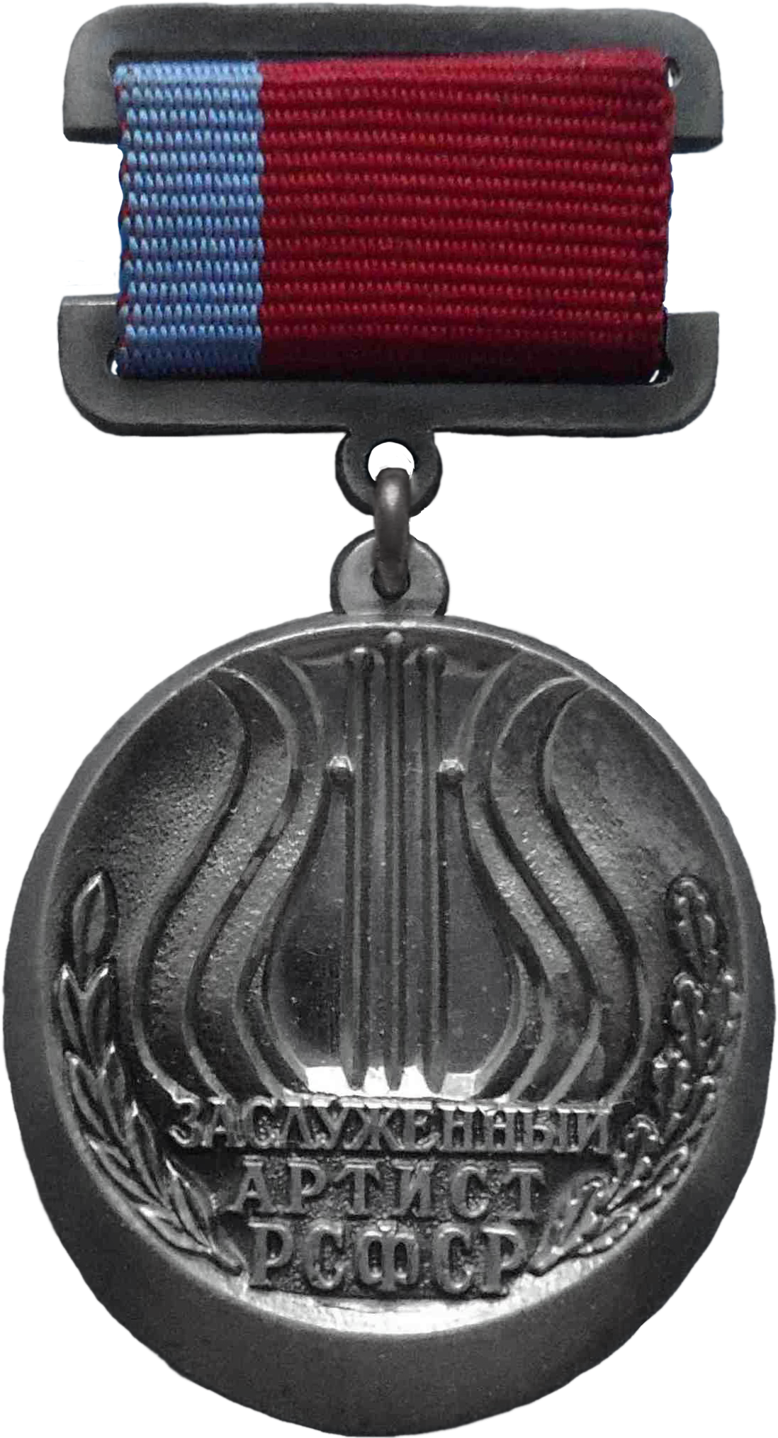 Заслуженный артист РСФСР